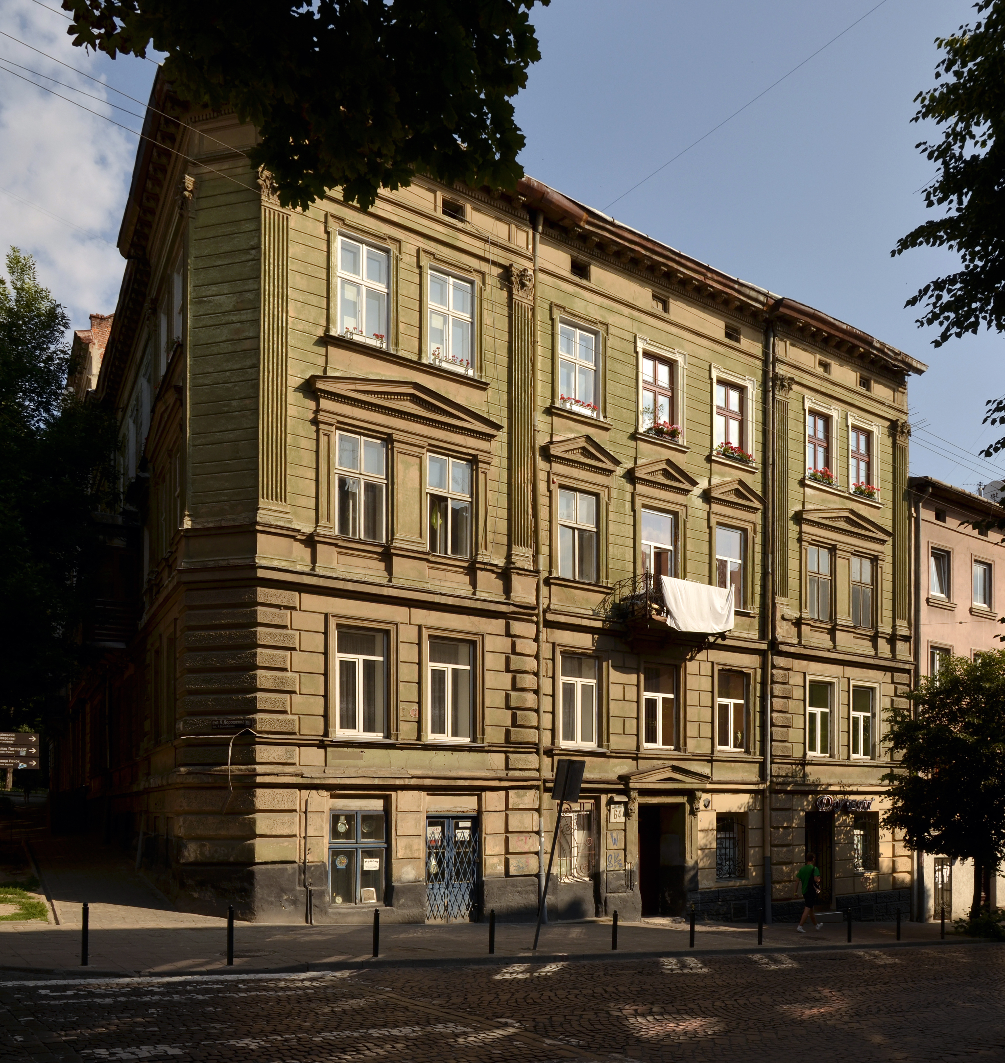 Будинок № 64 на вулиці Дорошенка у Львові. Збудований 1881 року. Архітектор Альбін Загурський (1846—1910).